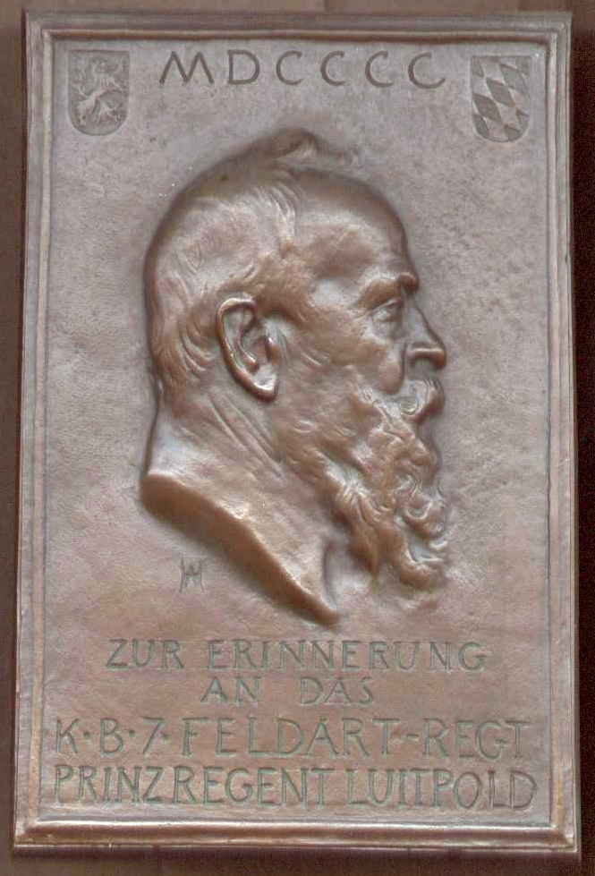 Adolf von Hildebrand (1847-1921), signiertes Bronzerelief des Prinzregenten Luitpold